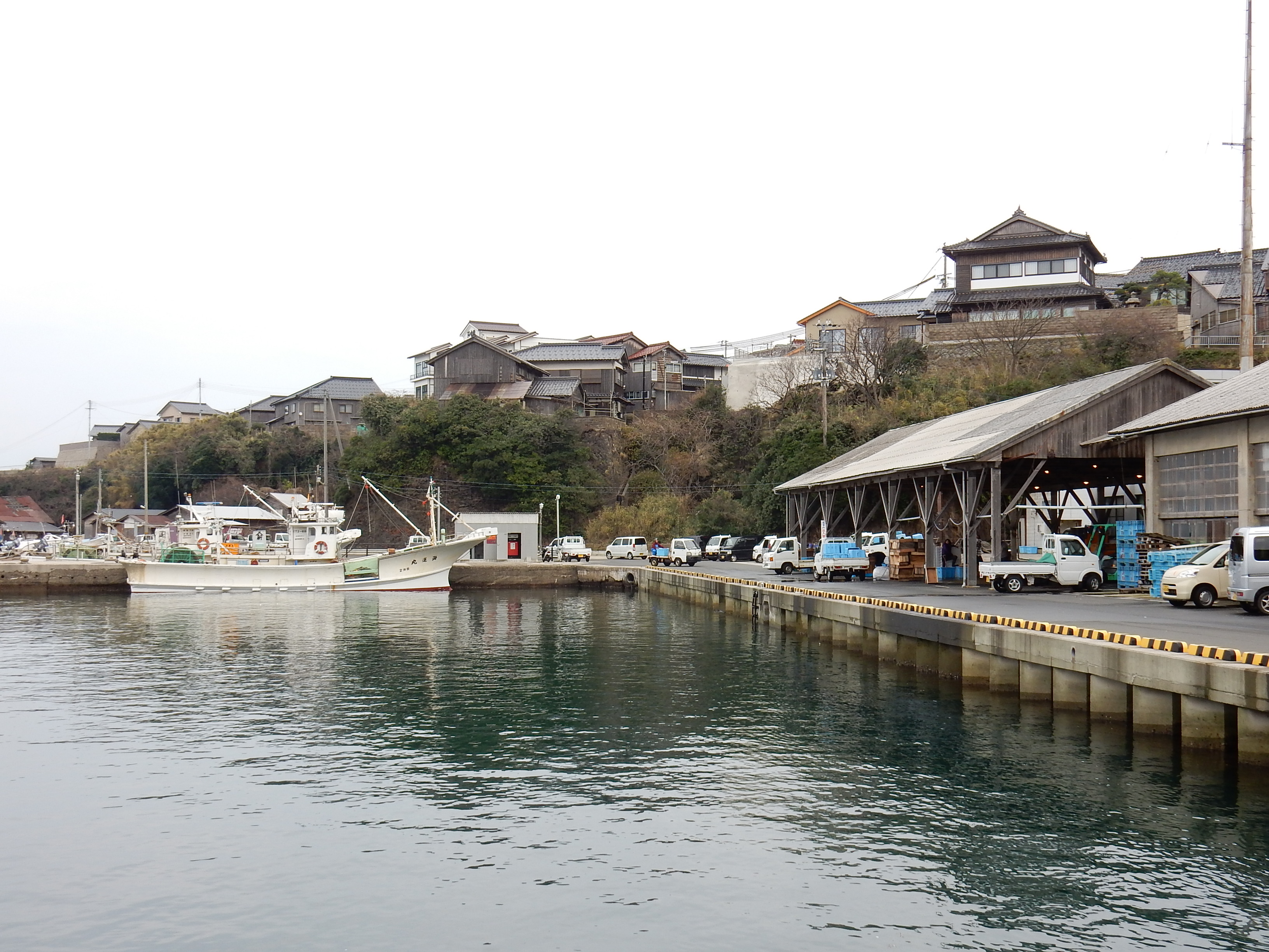 間人漁港（京都府京丹後市丹後町間人）